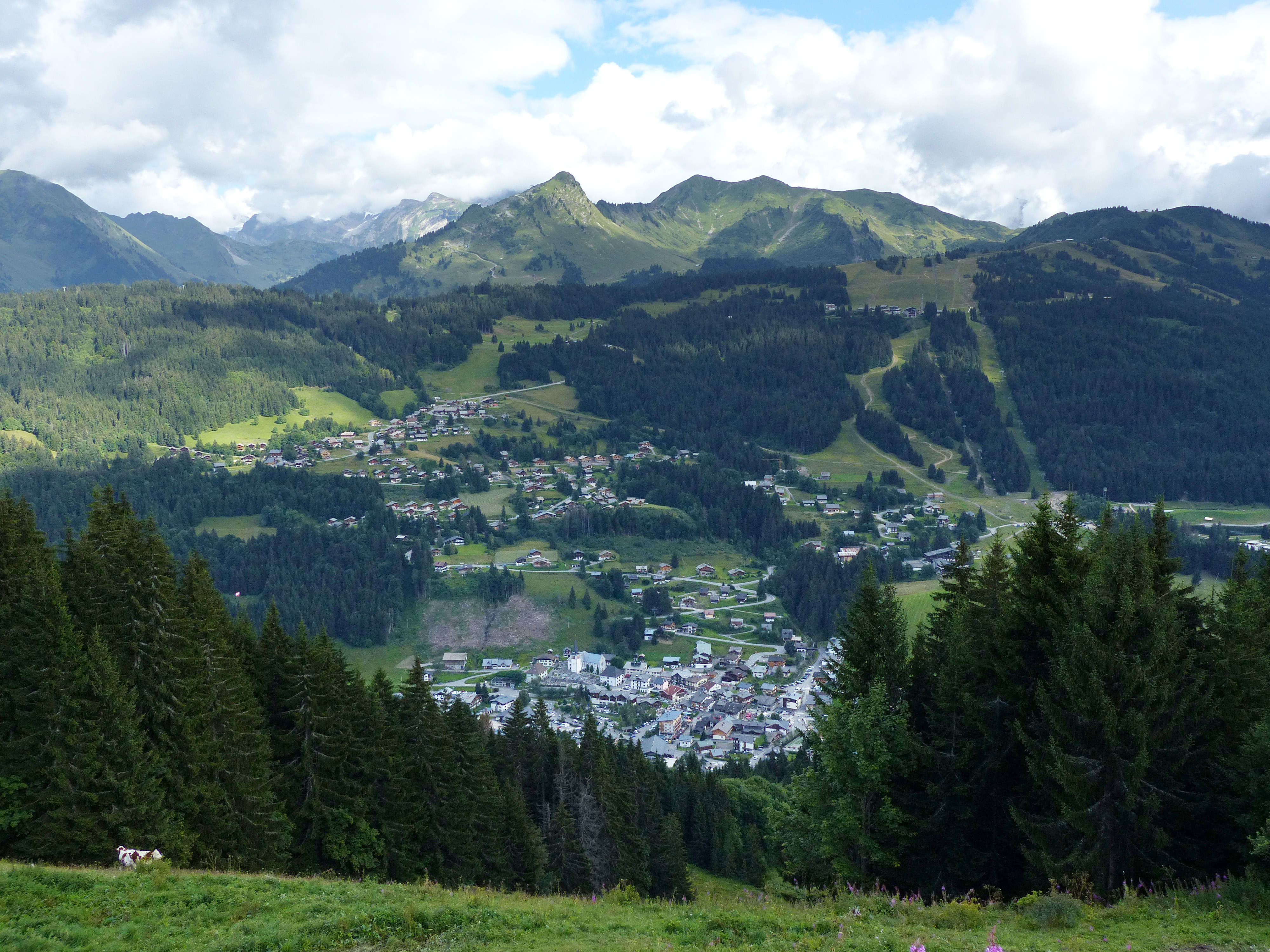 Les Gets (Haute-Savoie, France)